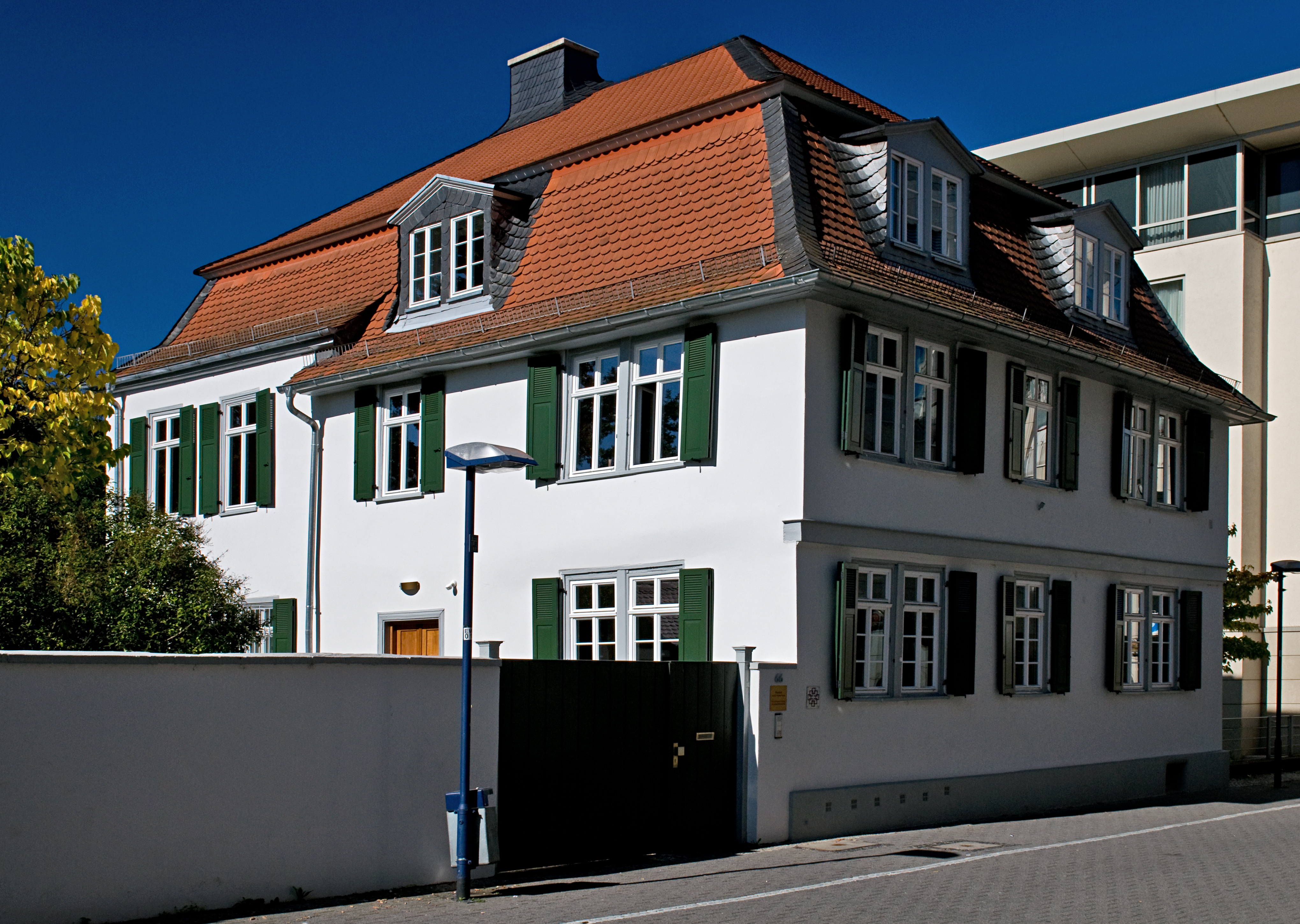 Pfarramt der französisch reformierten Kirche in Offenbach am Main